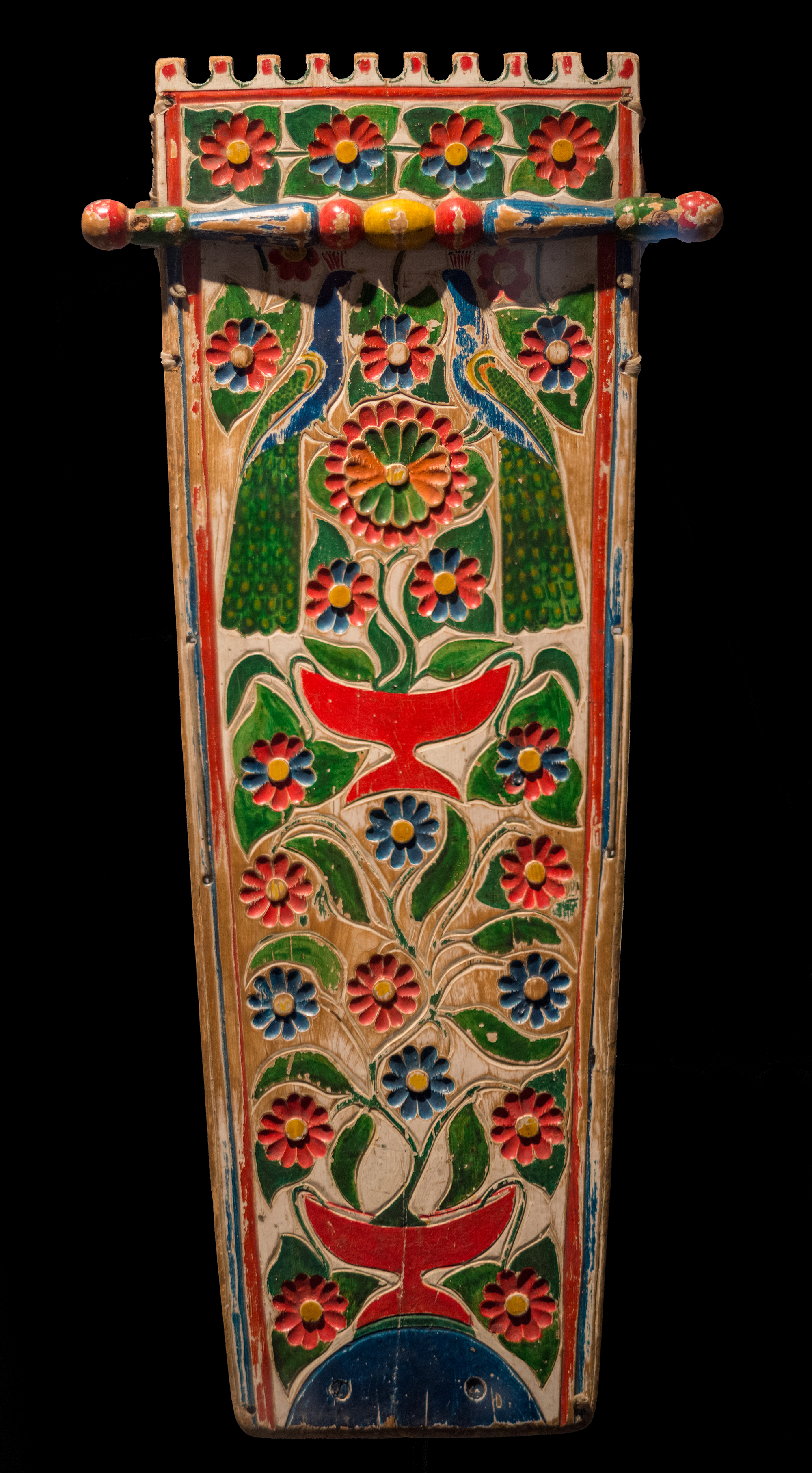 Dans sa conception, on note que l'appui-pied de ce porte-bébé est rectangulaire, et sa face inférieure convexe. Il est vissé à la pièce principale. Le cerceau est retenu par des vis, des clous, des lanières de cuir et une pièce de bois située de l'autre côté de la planche. La pièce principale forme un trapèze dont le bout le plus large est composé de dentelures. Comentaire Historique Ce porte-bébé est issu de la production artisanale des kanien’kehá:ka (Mohawks de Kahnawake). Richement décoré de motifs floraux et d’oiseaux sculptés en bas-relief, il est rehaussé de différentes couleurs. Les motifs polychromes symbolisent l'environnement dans lequel l'enfant est appelé à grandir. Selon les représentations, ils peuvent également marquer l'appartenance à un clan. La collection Coverdale conserve une trentaine de ces porte-bébés provenant de Kahnawake. La période de production de ces objets s’étend des années 1840 jusqu’au tout début du XXe siècle. Les motifs représentés se rattachent clairement au style victorien, dont l’influence se retrouve également et au même moment dans la production artisanale de plusieurs autres nations autochtones du Québec. Dimensions Hauteur 29.0 cm closeLargeur 26.5 cm closeLongueur 76.0 cm Periode 2e moitié du 19e siècle Culture Premiers peuples; Haudenosaunee; Iroquois; Kanien’kehá:ka; Mohawk Groupe Ethnolinguistique Iroquoien